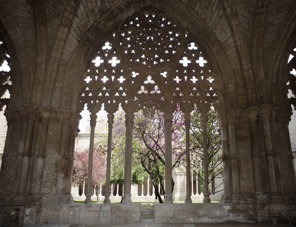 unidentified Spain